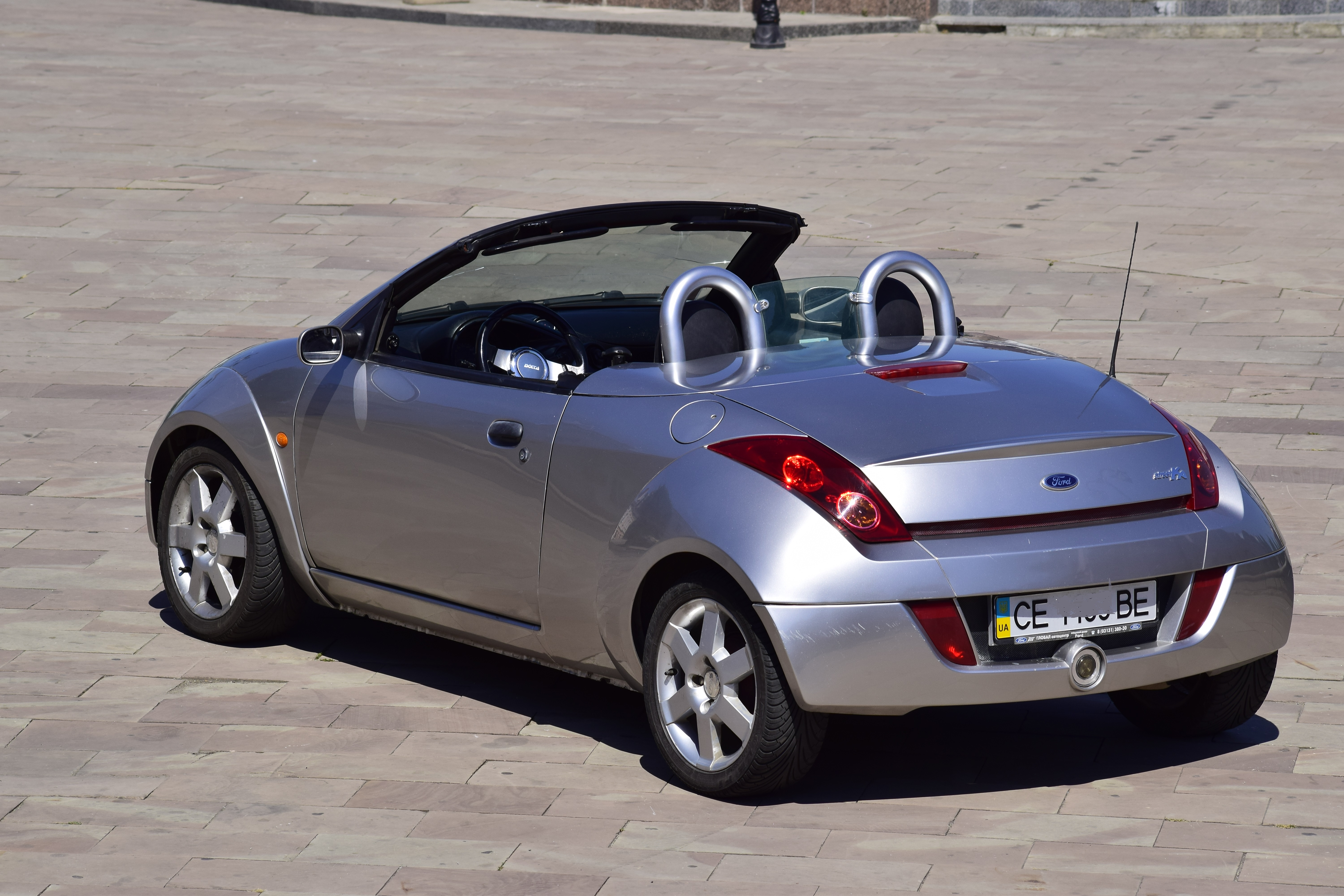 streetka